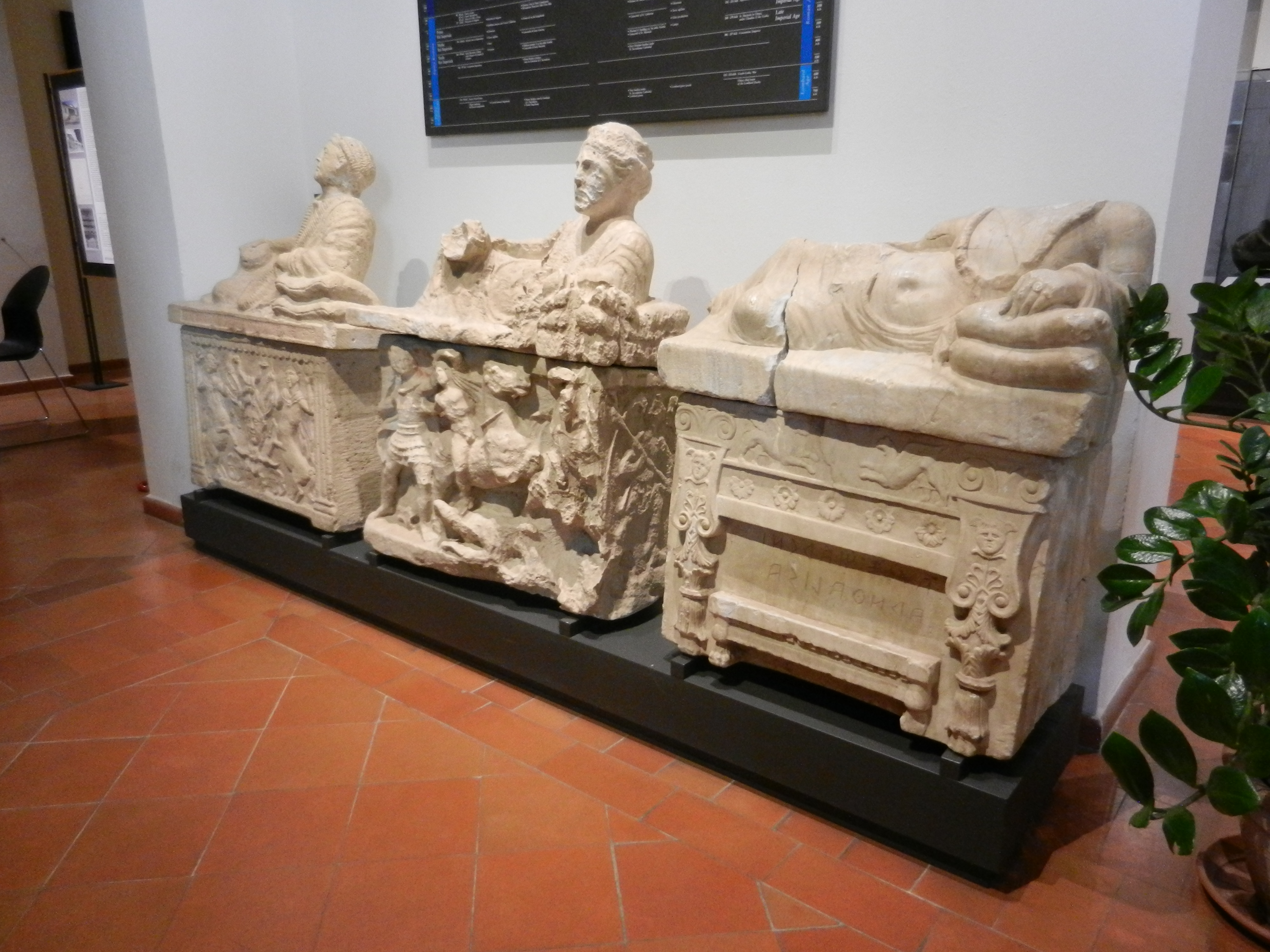 Etruščanski sarkofagi v muzeju v Chiusiju, Italija.